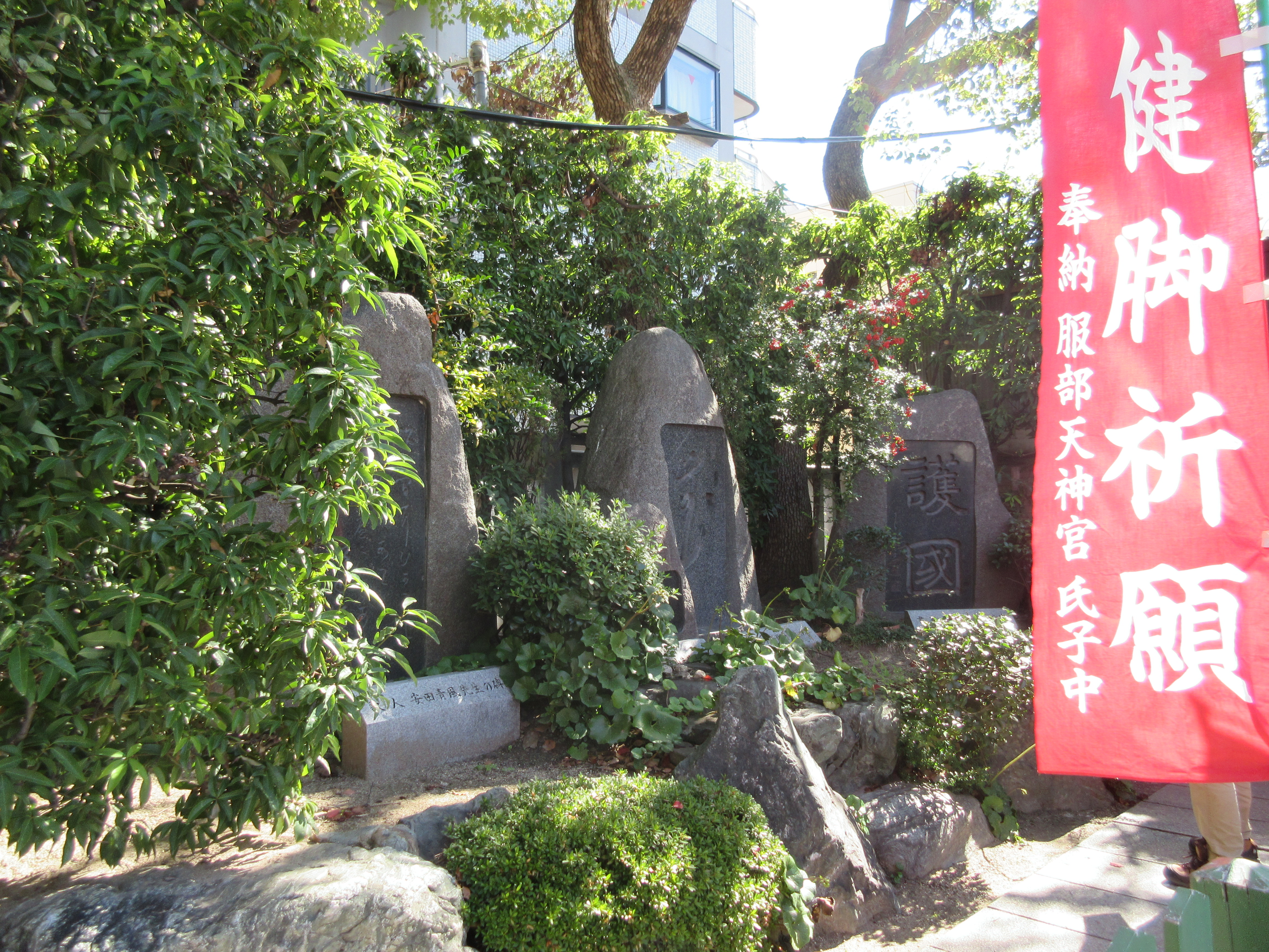 服部天神宮 豊中三大文化人（西田王堂、矢野橋村、安田青風）の碑